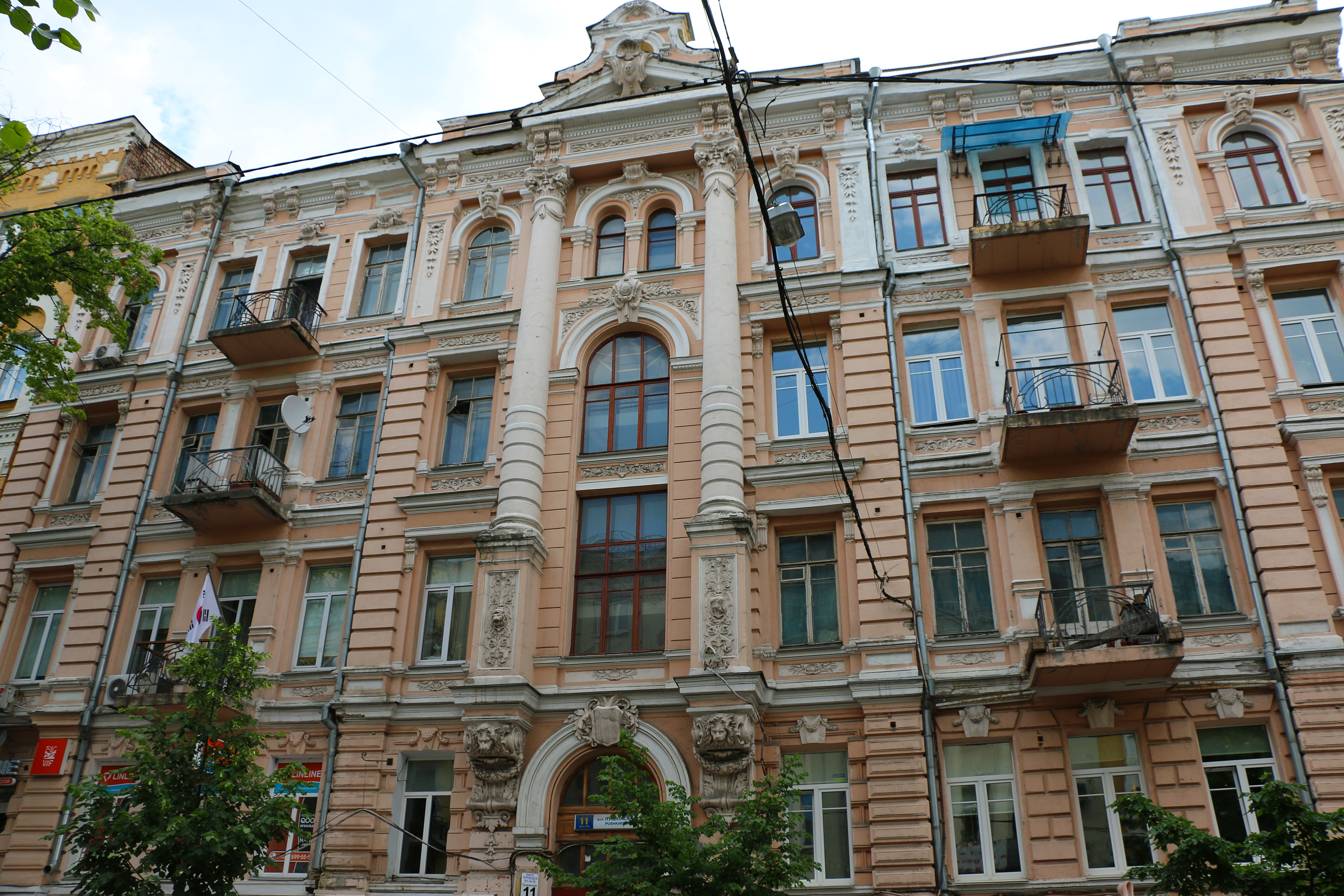 Будинок прибутковий, Київ, Пушкінська вул., 11